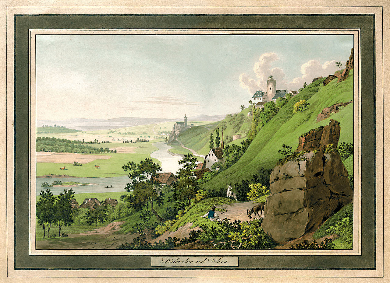 Blick über Dehrn nach Dietkirchen, Aquatinta koloriert um 1815